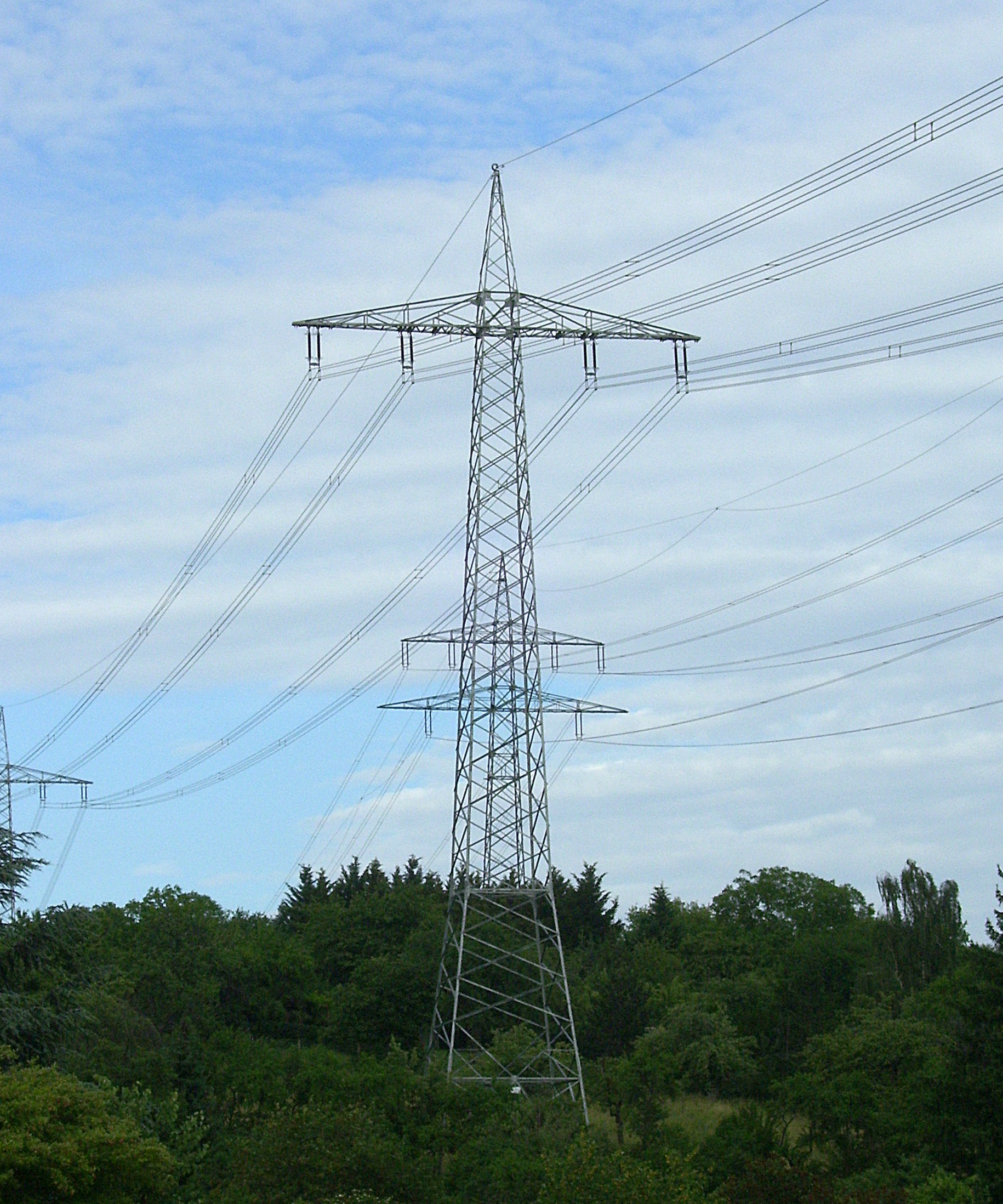 Die Bahnstromleitung Neckarwestheim–Zazenhausen mit Viererbündelleitern auf ihrem letzten Abschnitt vor der Zentraleinspeisstelle Zazenhausen